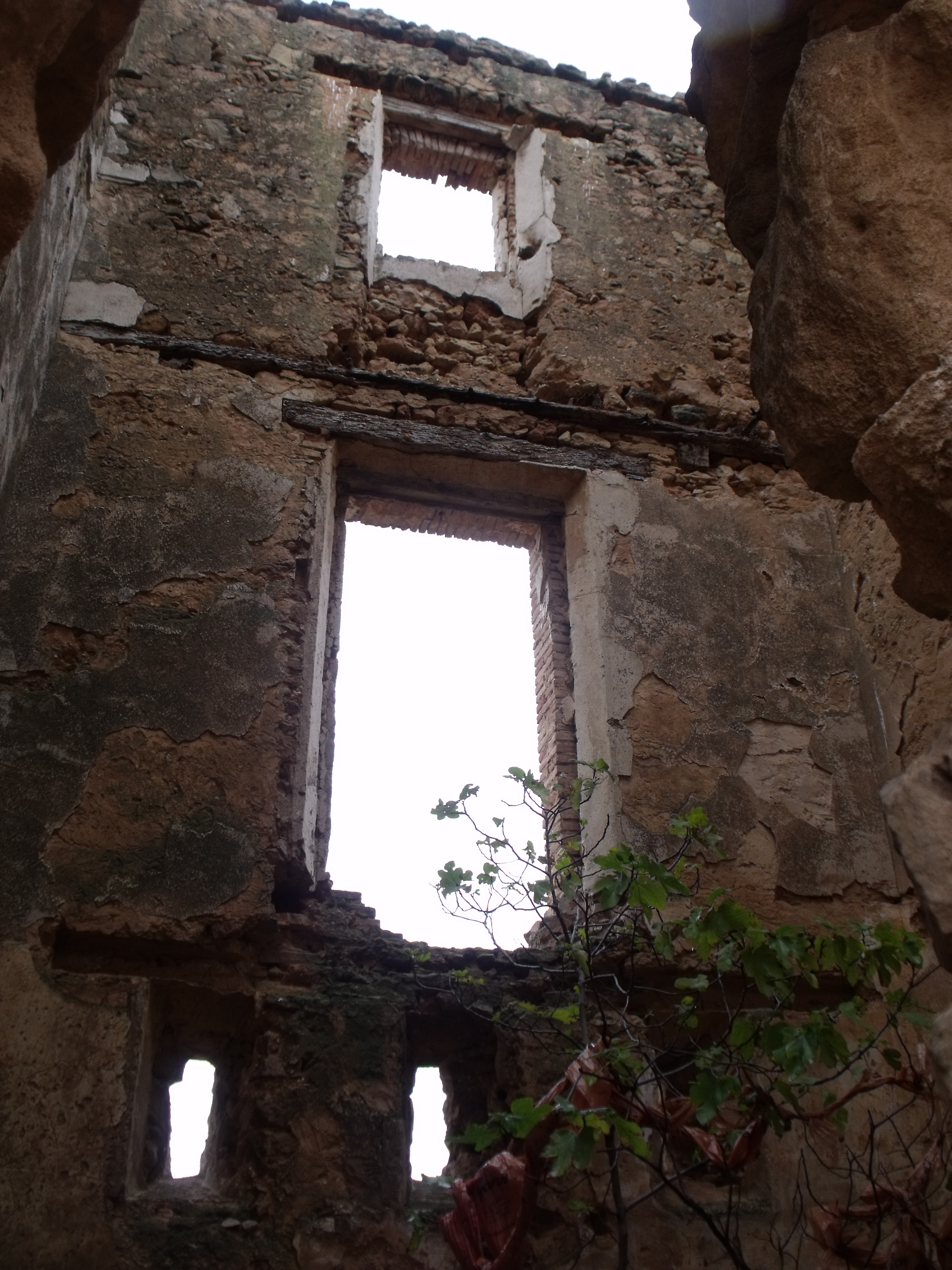 Vistas diversas de la torre de la Jedrea, en San Antonio de Requena